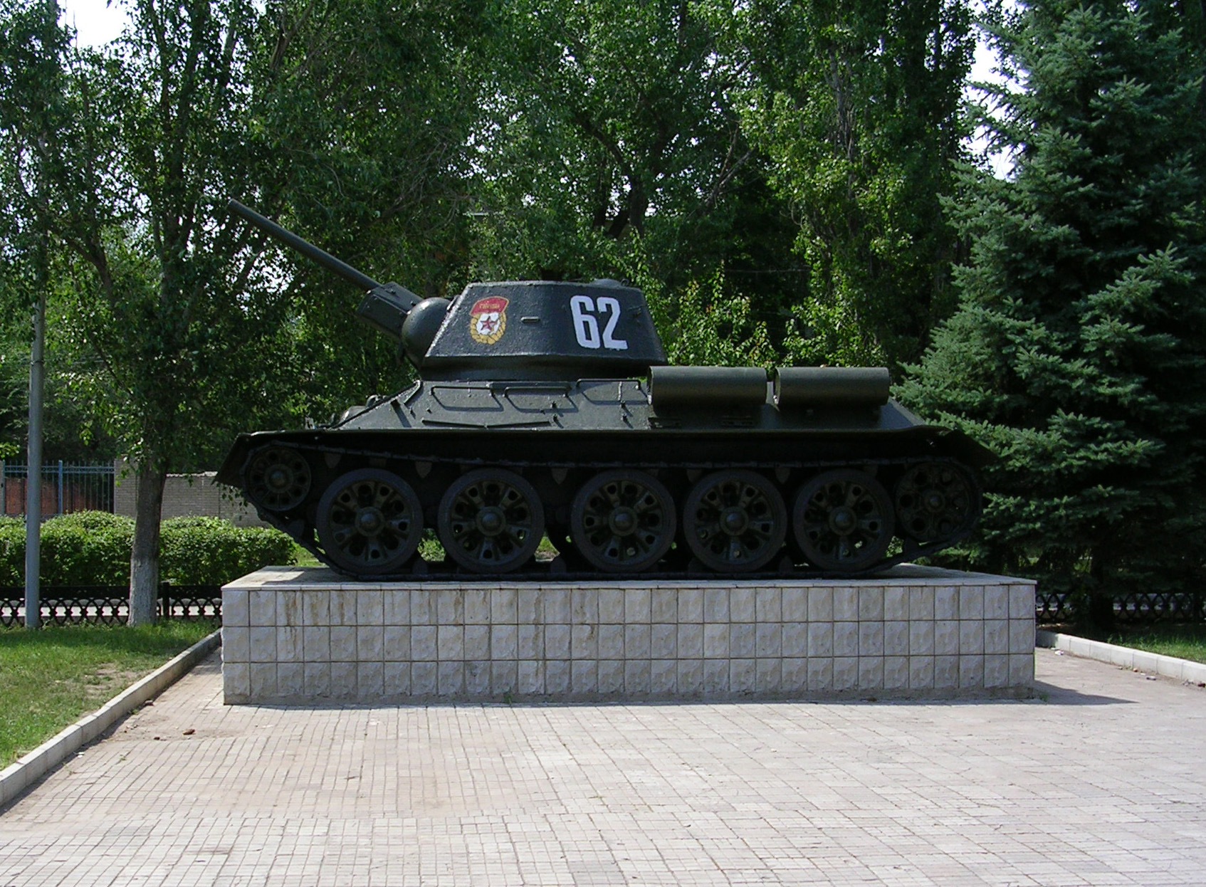 Памятник Т-34 в г. Каменск-Шахтинский